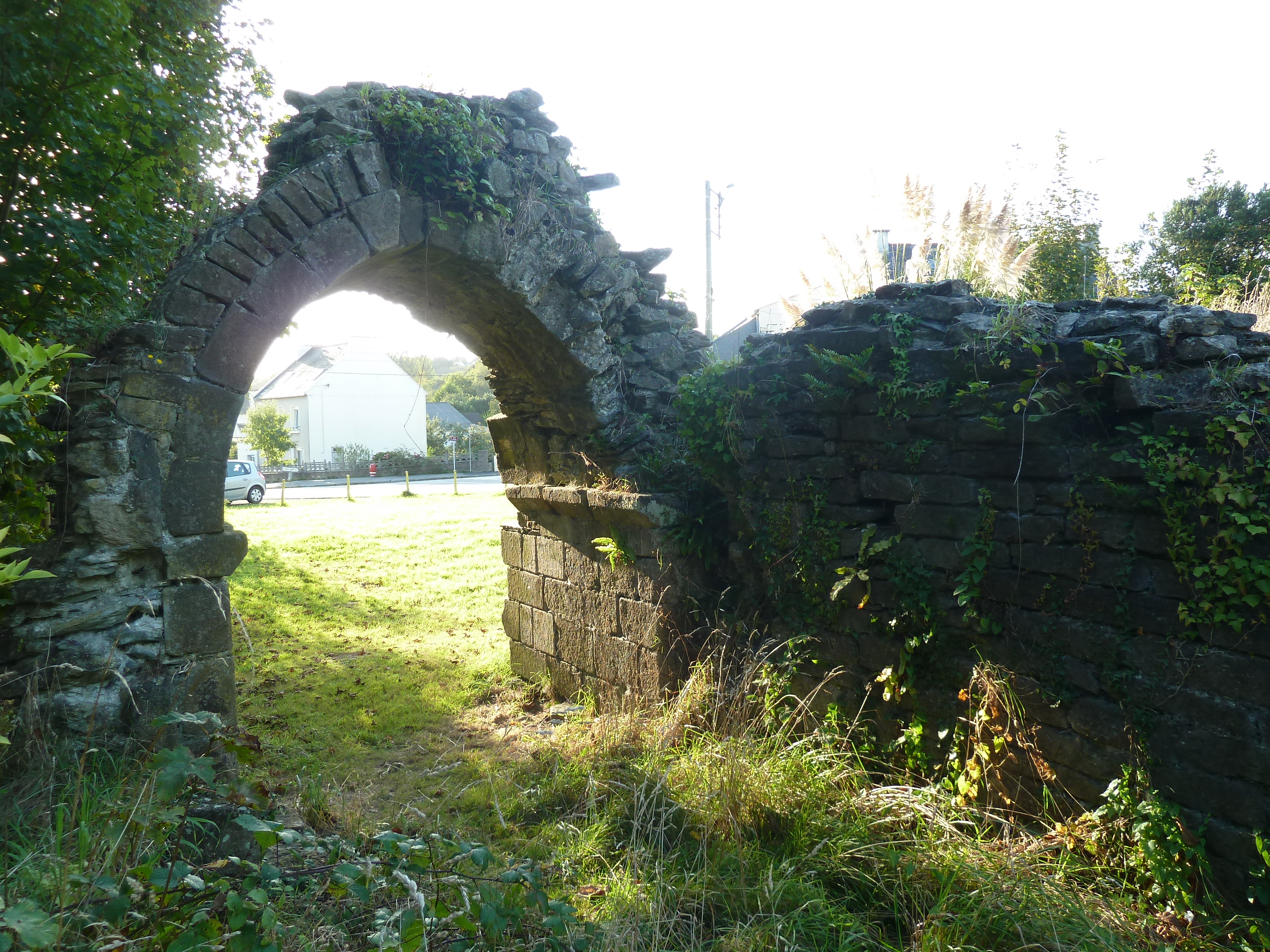 Château de Joyeuse Garde à La Forest-Landerneau